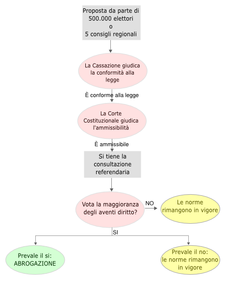 Schema che descrive il referendum abrogativo, istituito con l'articolo 75 della Costituzione Italiana